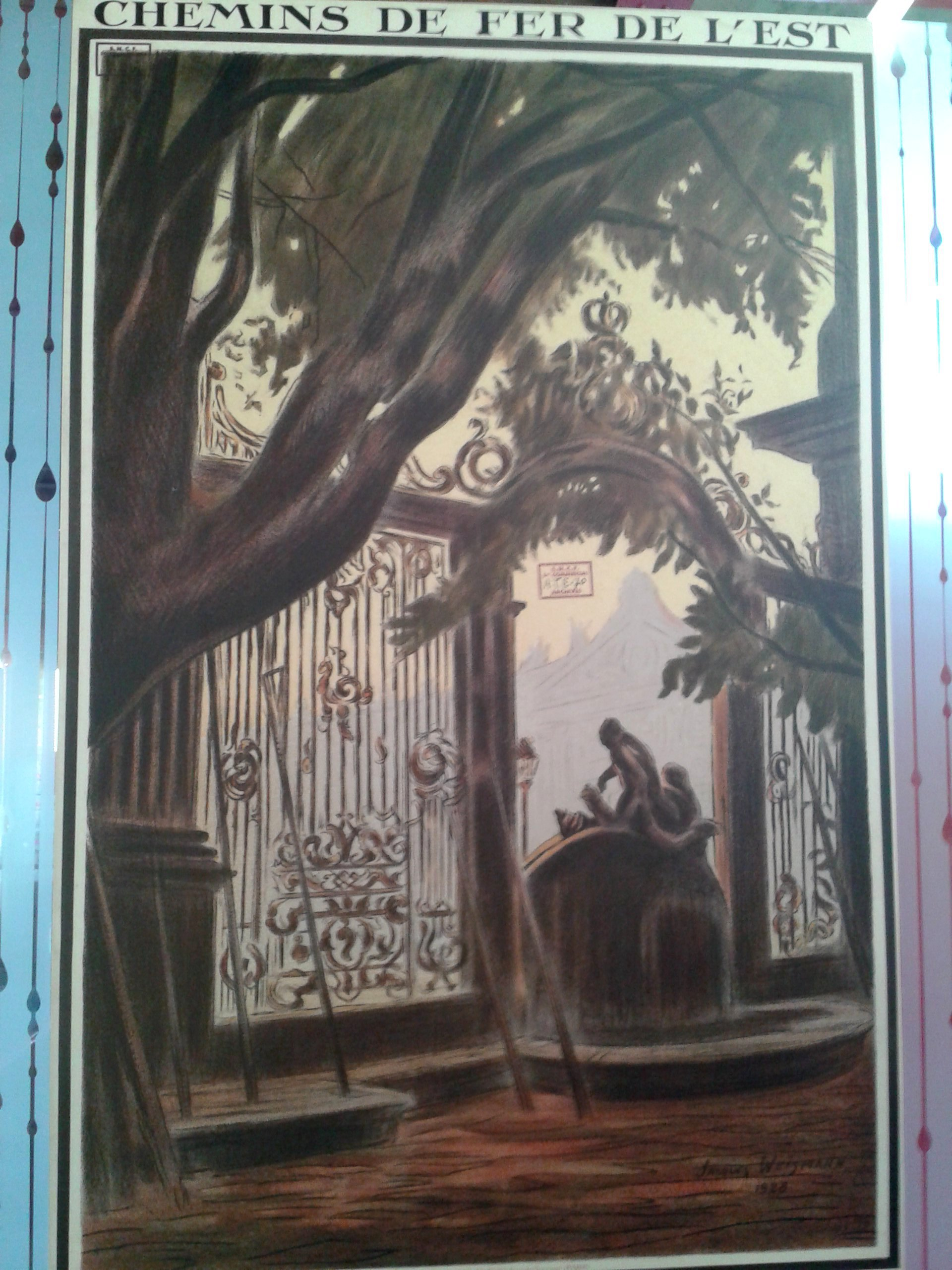 Vue d'une affiche (reproduction) prise en gare de Nancy dans l'espace "Work station" - reproduction de la collection des chemins de fer de l'Est sous le numéro " ATE 70"